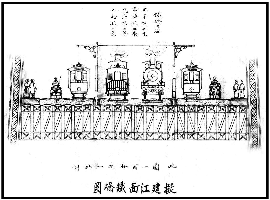 拟建江面铁桥图（截面图）